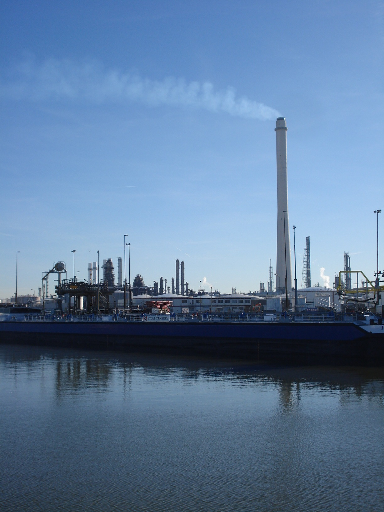 Schoorsteen Shell Pernis, 213 meter hoog